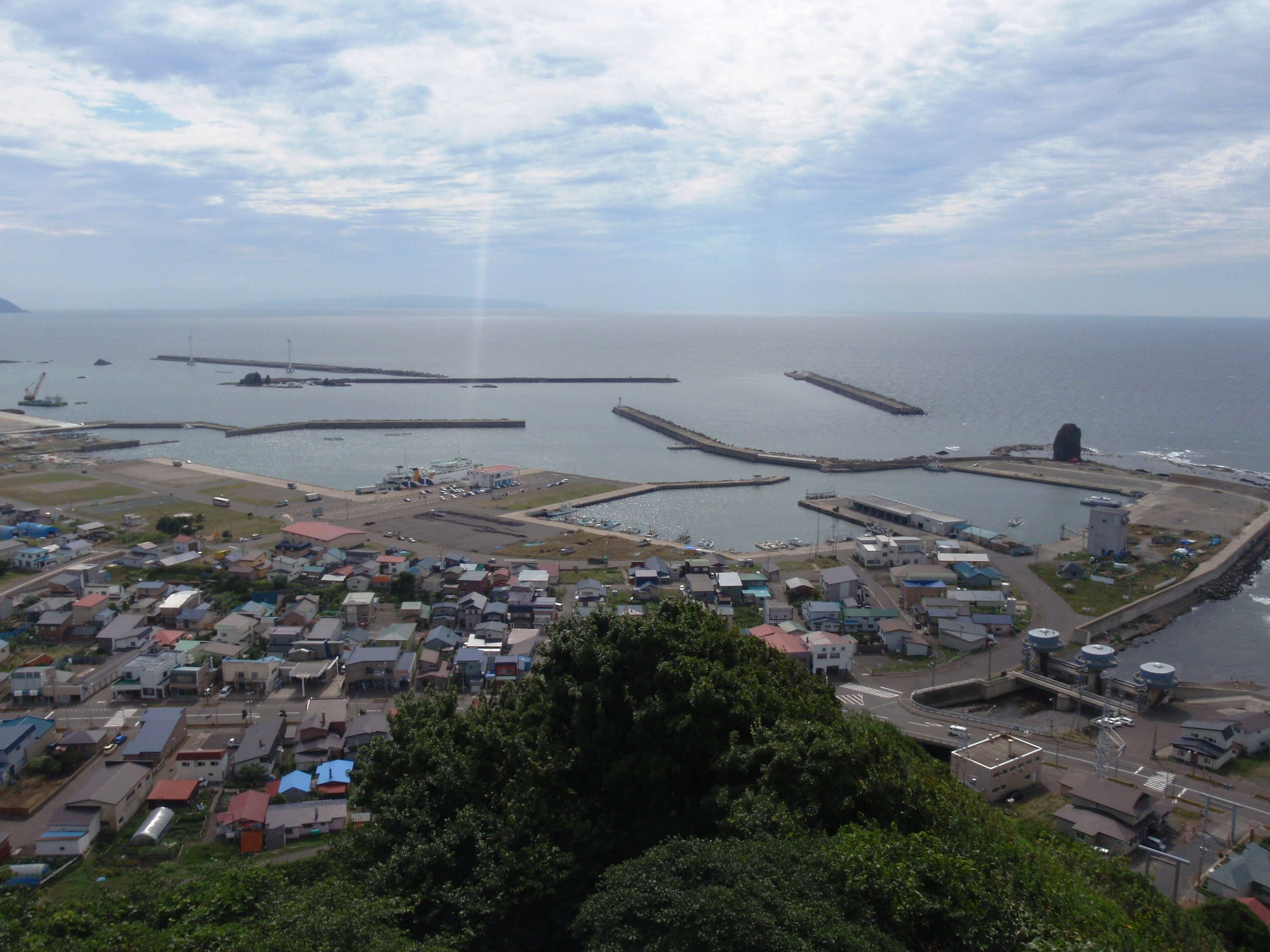 立象山から見る瀬棚港